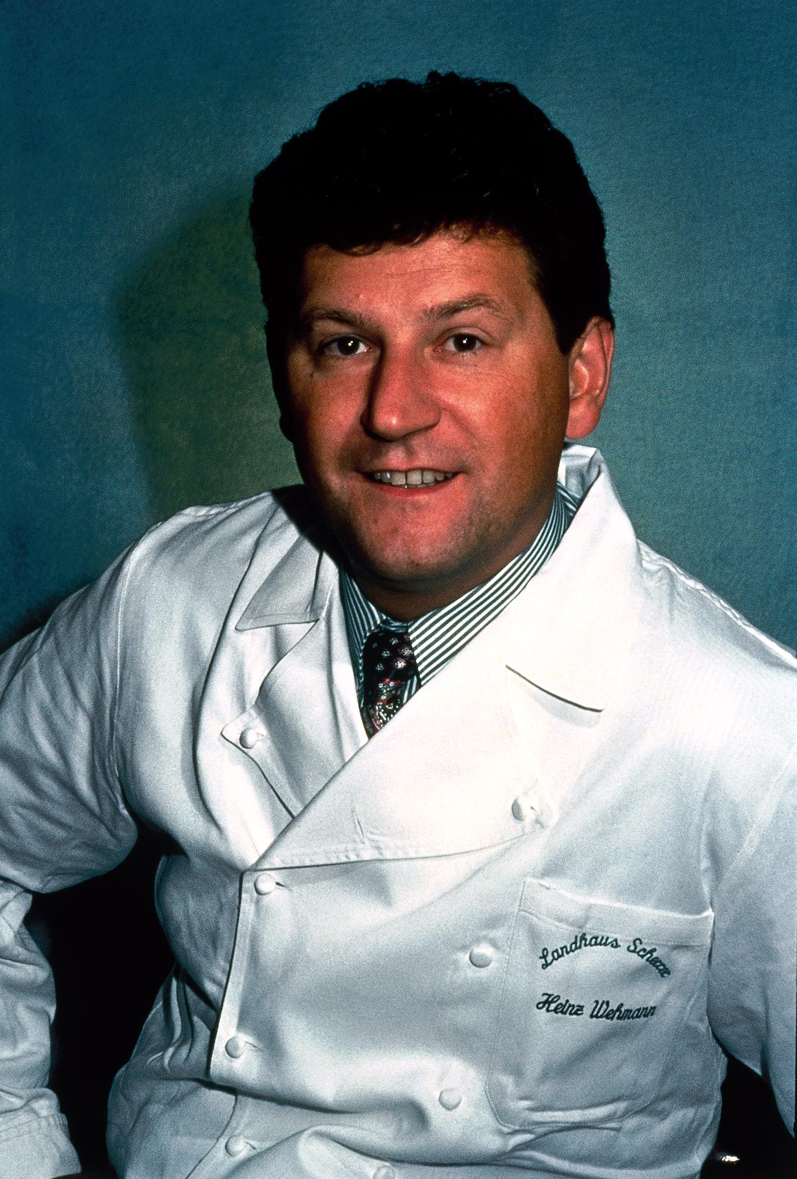 Portrait von Heinz Otto Wehmann. Aufgenommen von Julian Wehmann.